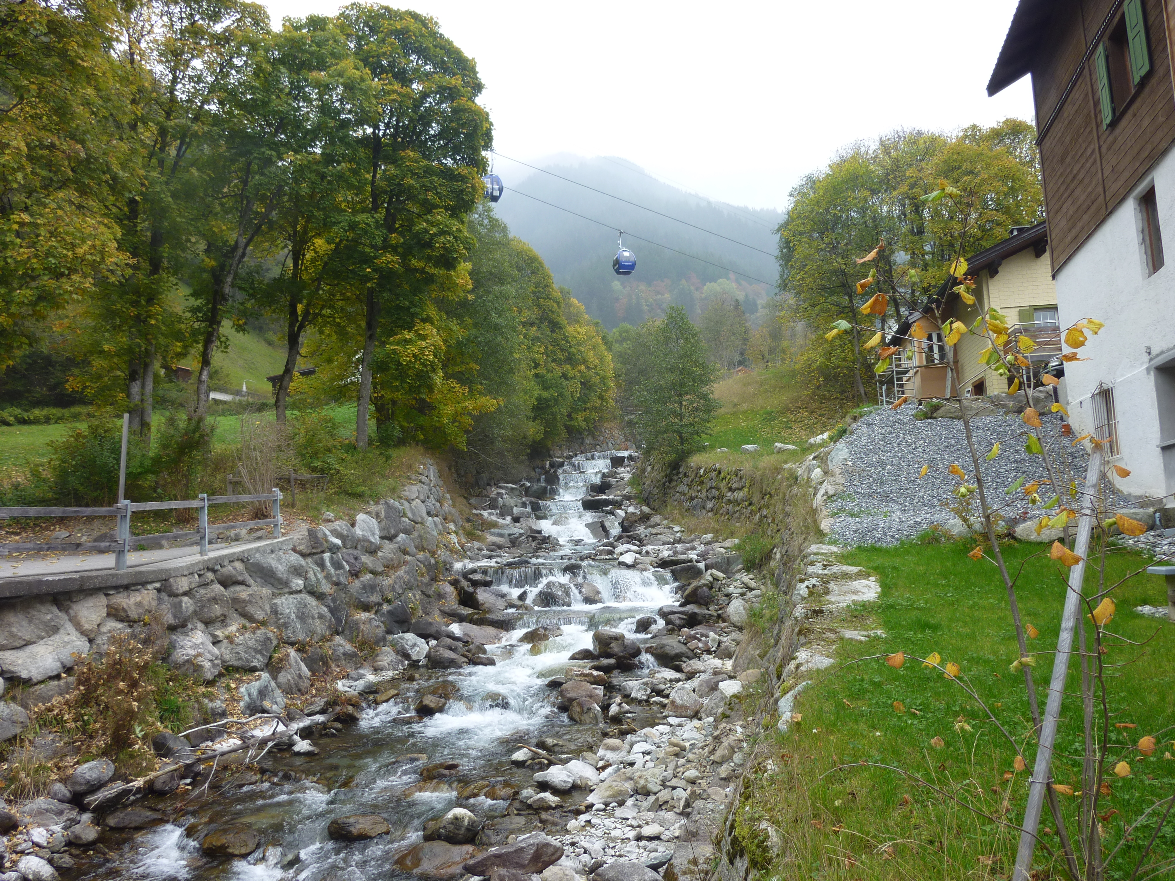 Schlappinbach in Klosters mit Gondel der Madrisa-Bahn